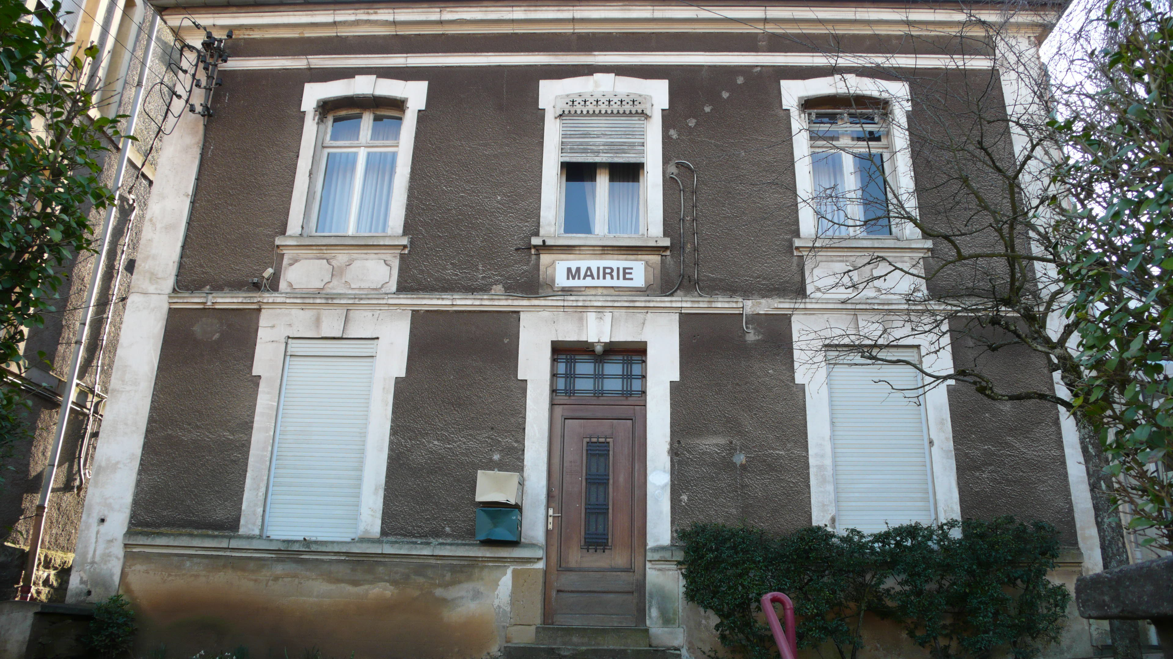 Gemeng Thil